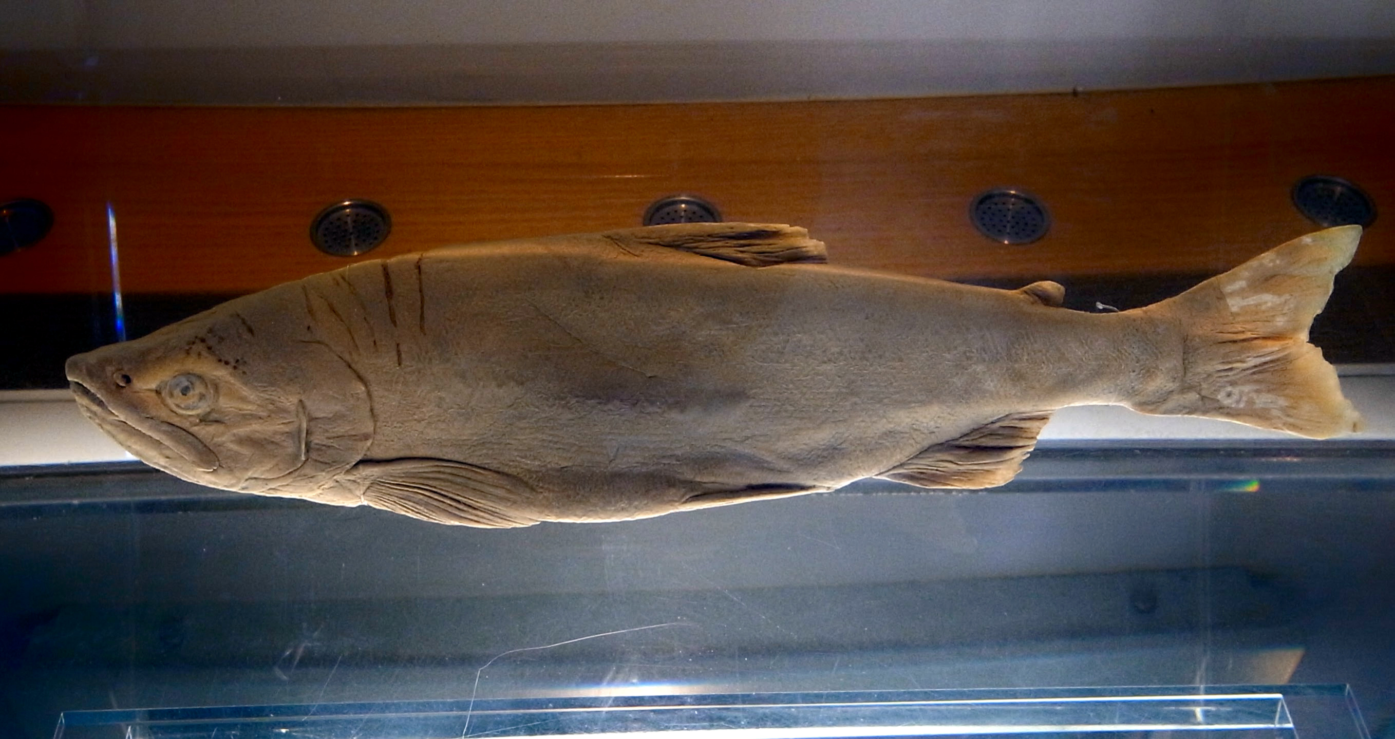 クニマス Kunimasu Domain: Eukaryota • Regnum: Animalia • Phylum: Chordata • Subphylum: Vertebrata • Infraphylum: Gnathostomata • Superclassis: Osteichthyes • Classis: Actinopterygii • Ordo: Salmoniformes • Familia: Salmonidae • Genus: Oncorhynchus Wikispecies has an entry on: Oncorhynchus kawamurae. Species Oncorhynchus kawamurae Jordan & McGregor, 1925 動物界 脊索動物門 条鰭綱 サケ目 サケ科 サケ属 Location: 滋賀県立琵琶湖博物館 / Lake Biwa Museum NCBI Taxonomy ID:1278982 ITIS link: Oncorhynchus kawamurae Jordan & McGregor, 1925 (mirror) EOL link: Oncorhynchus kawamurae uBio search link: Oncorhynchus kawamurae Copyright: User:OpenCage